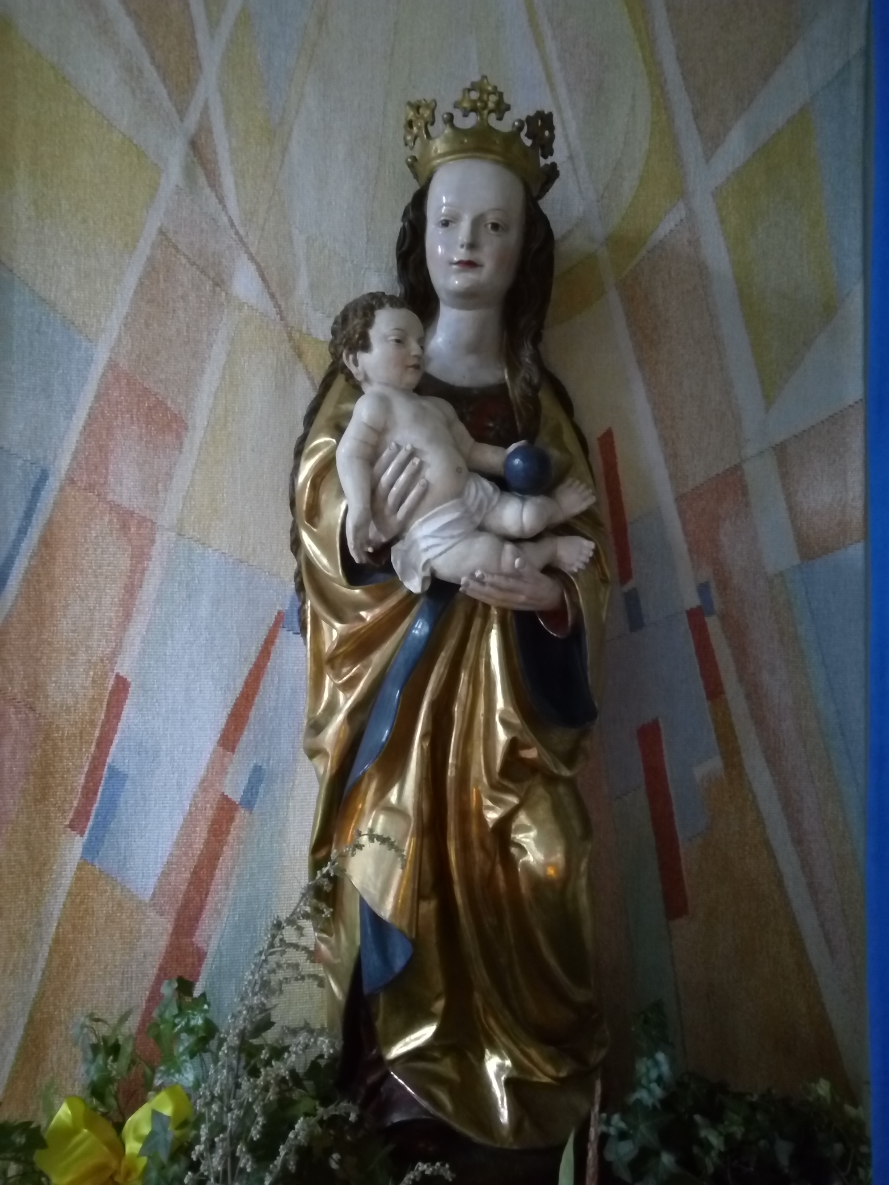 Marienfigur aus dem 15. Jahrhundert